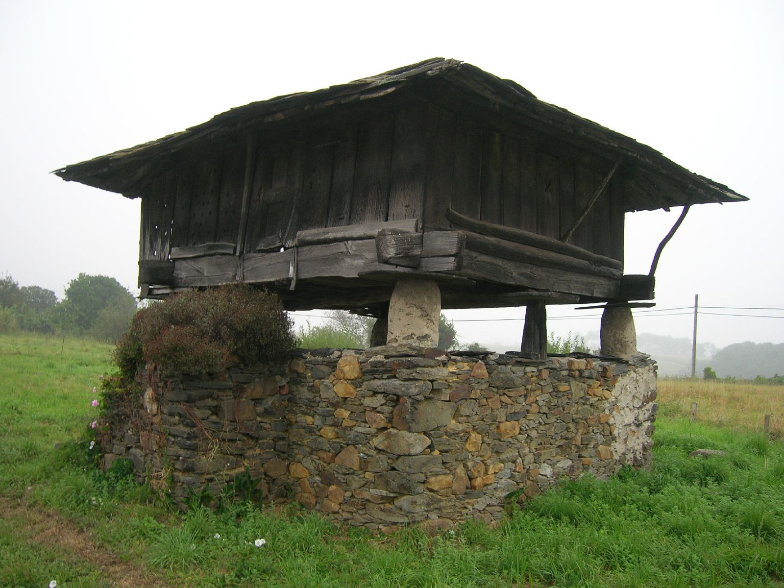 Típico granero que encontraremos a menudo en tierras asturianas.